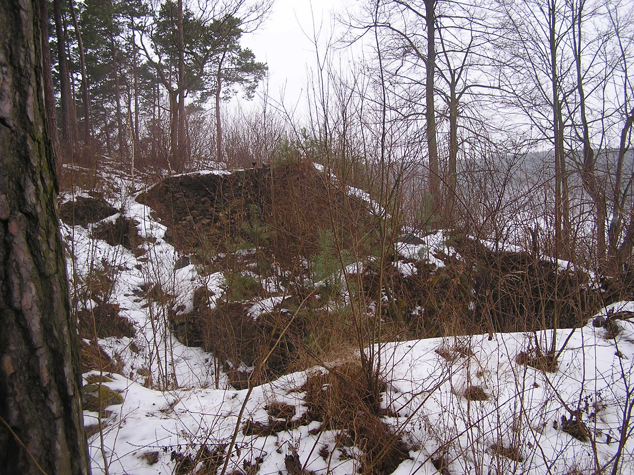 Hrad Velešín, zřícenina a archeologické stopy (Hrachovy Hory), nad vtokem Strahovského potoka do Malše, Hrachovy Hory